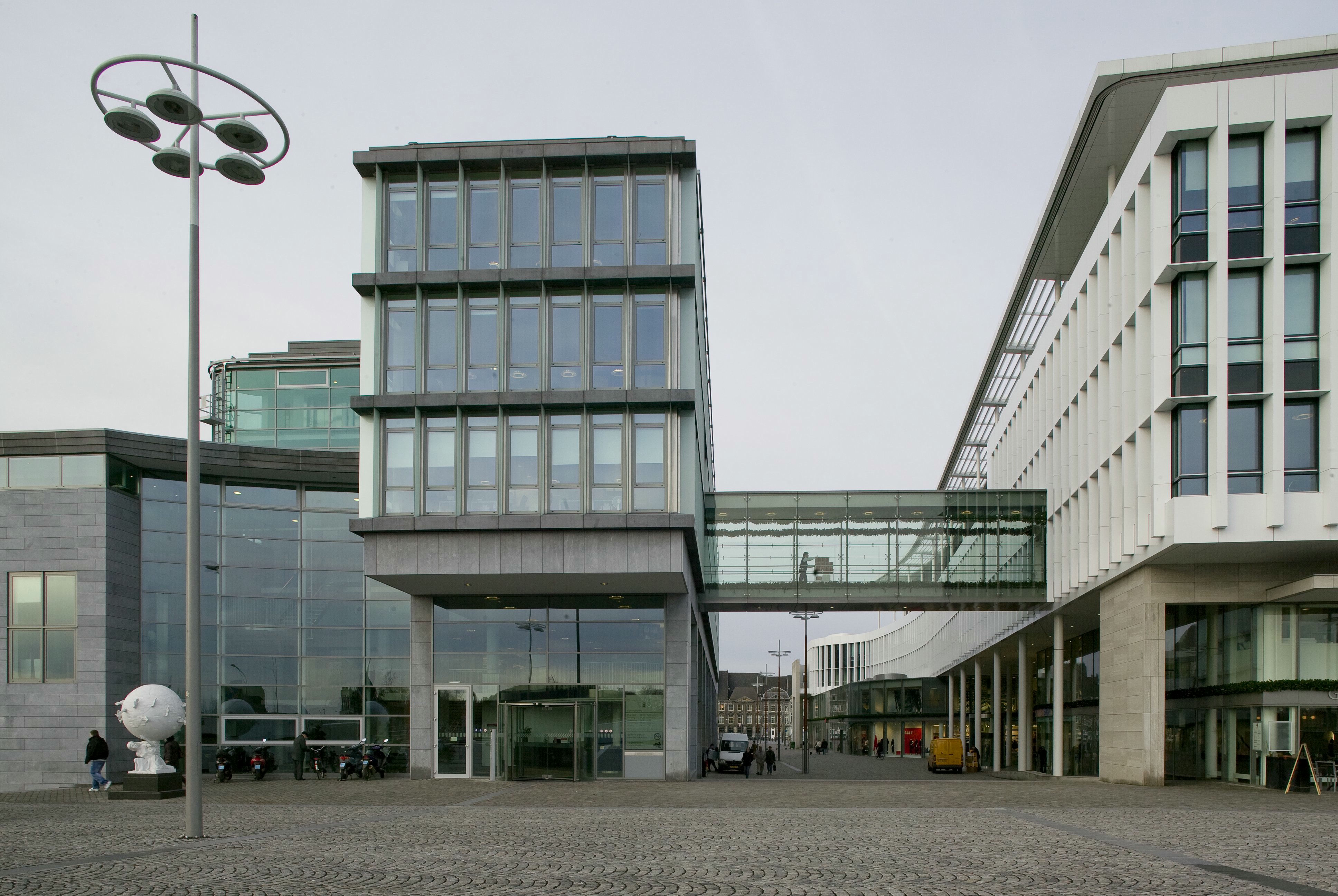 Mosae Forum: Overzicht 'Mosae Forum', Maaszijde